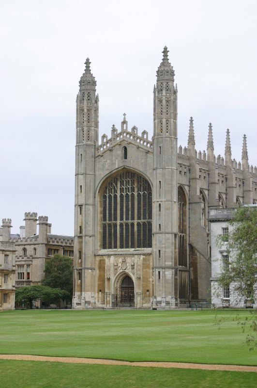 Kirken King's College Cambridge